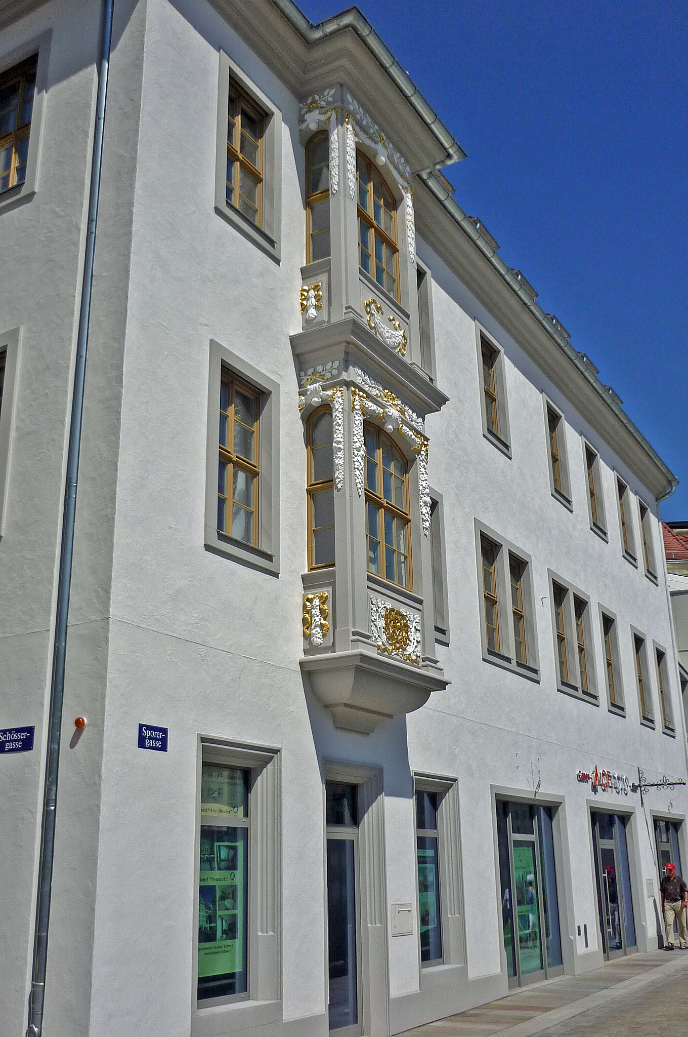 Bose-Haus in Dresden, Sporergasse Ecke Schössergasse